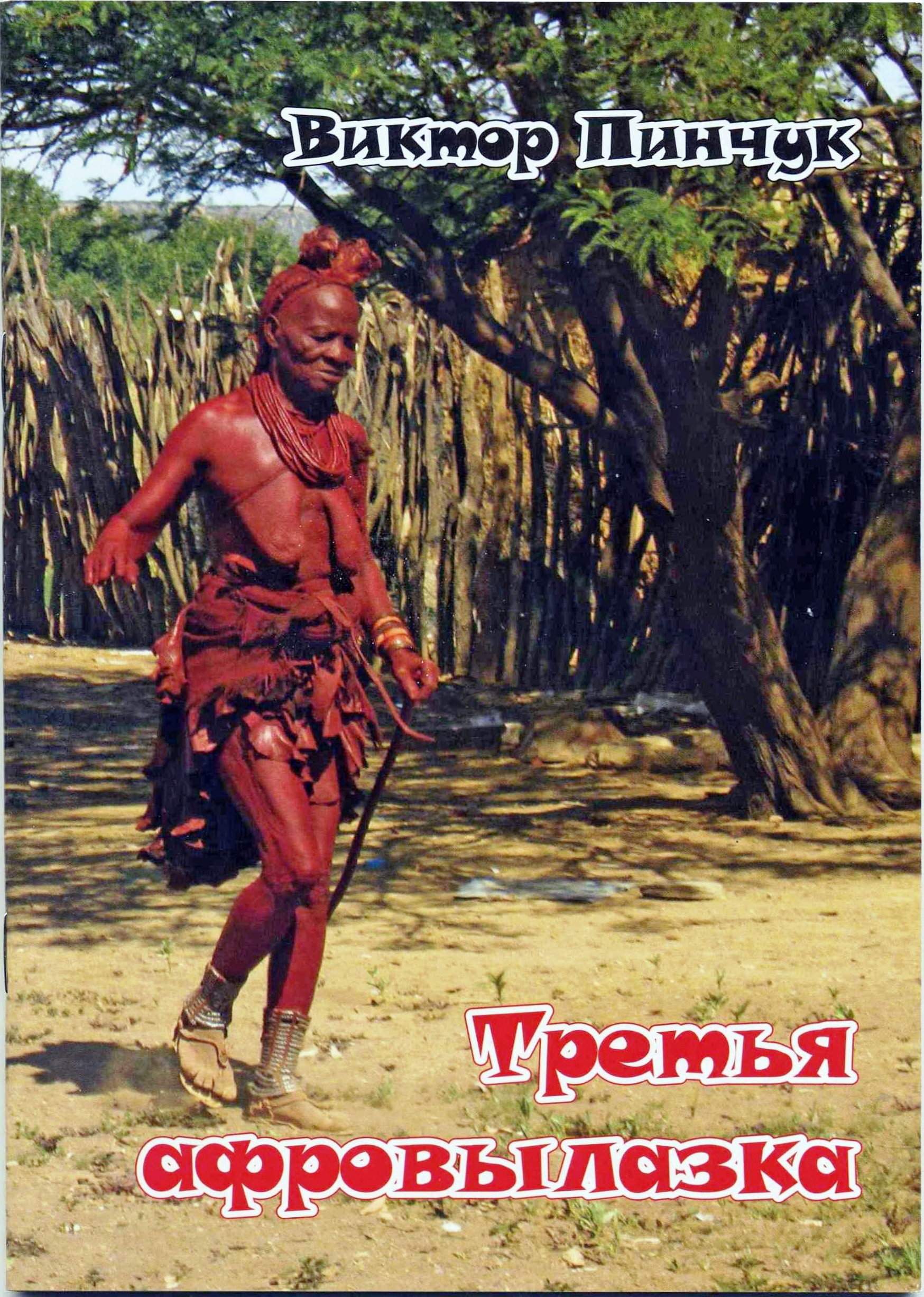 Пинчук В. В. "Третья афровылазка", ISBN 978-617-671-039-4 (обложка) Pinchuk V. "Third trip to Africa", ISBN 978-617-671-039-4 (cover)